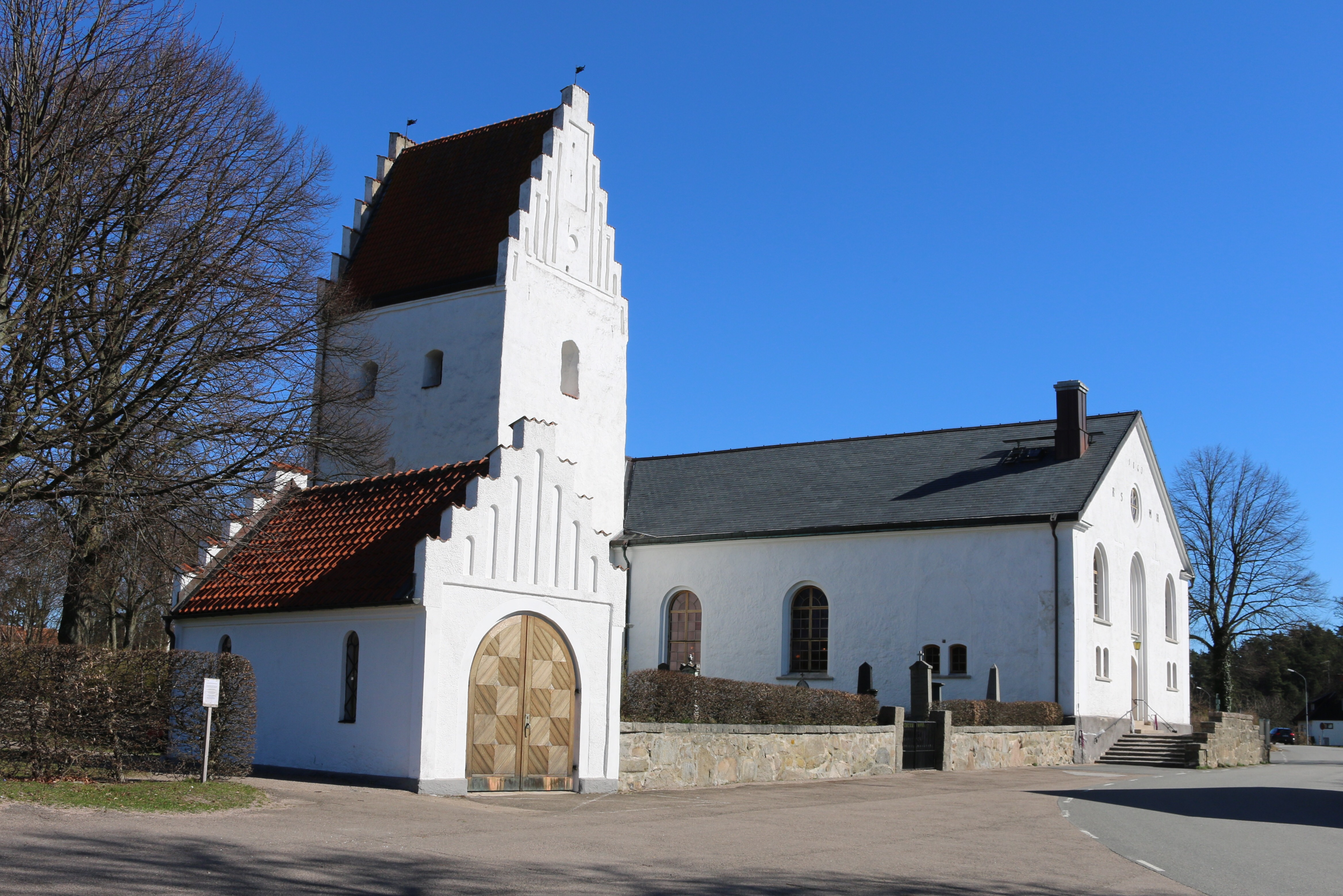 Degeberga kyrka